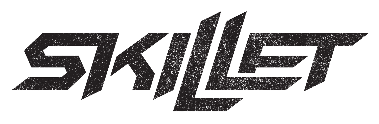 Логотип группы Skillet